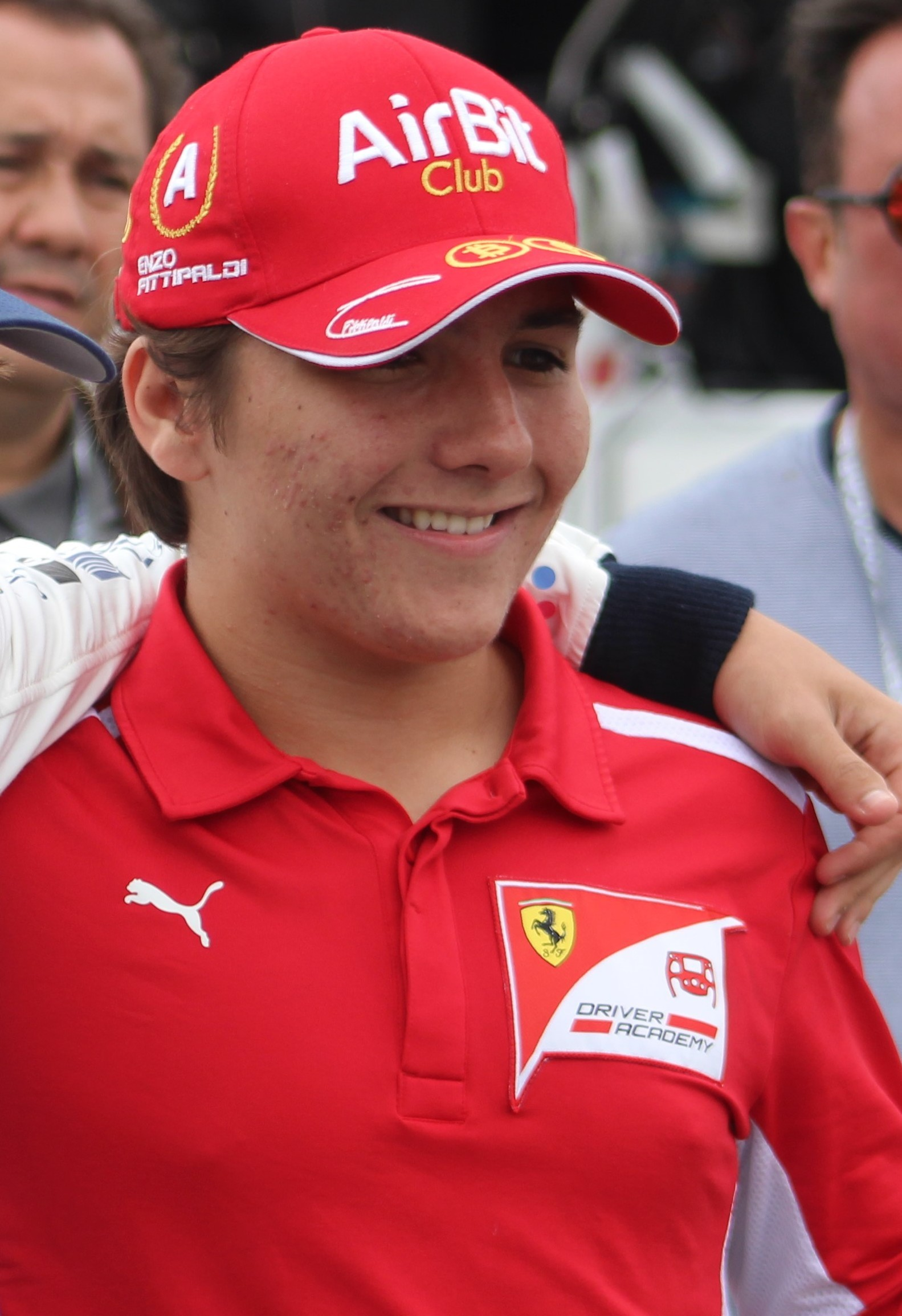 pietro & enzo fittipaldi